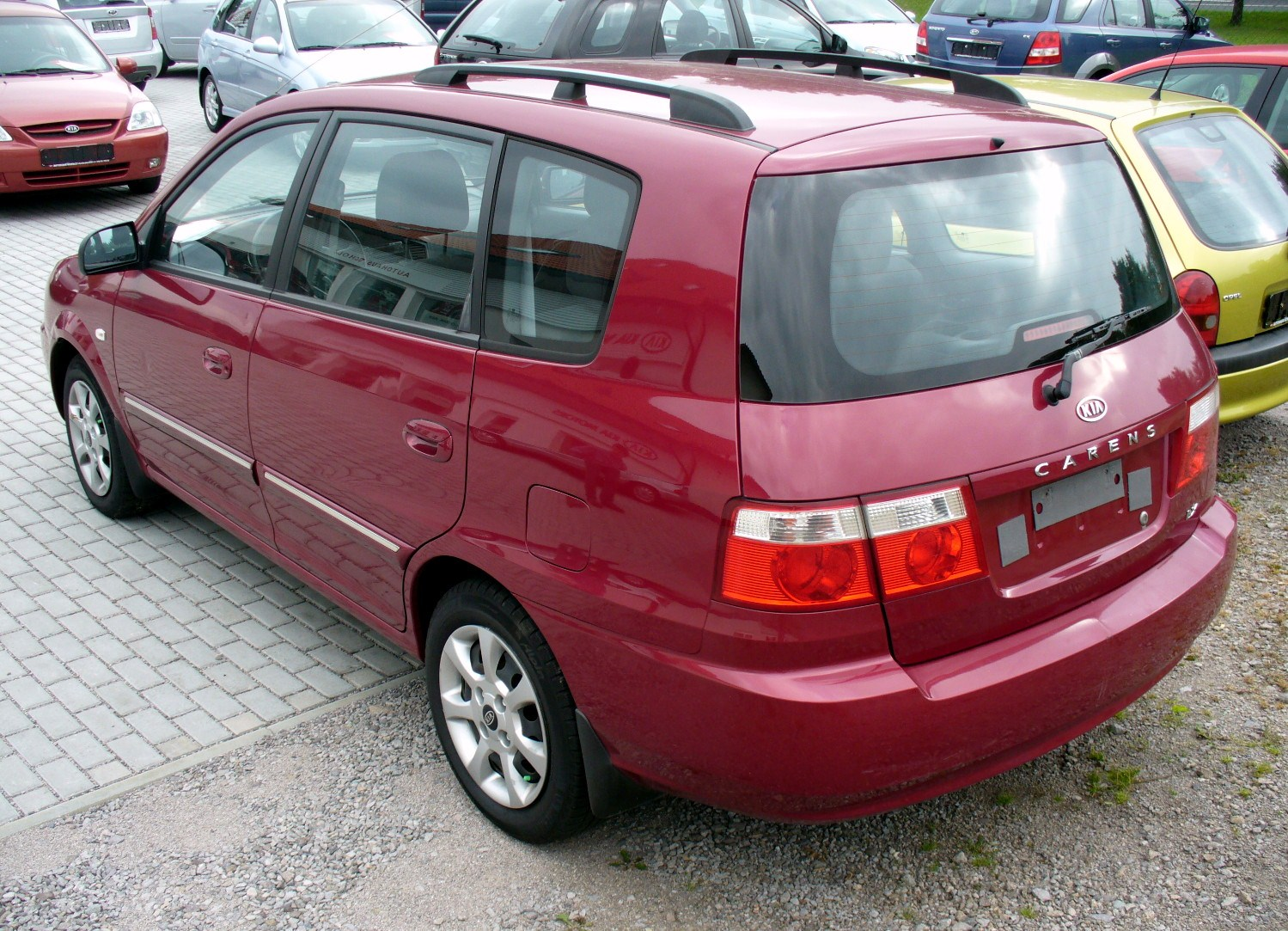 Kia Carens